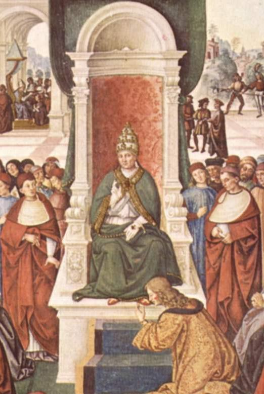 Deitsch: Freskenzyklus zu Leben und Taten des Enea Silvio Piccolomini, Papst Pius II. in der Dombibliothek zu Siena, Szene: Enea Silvio Piccolomini vor dem Papst Eugen IV